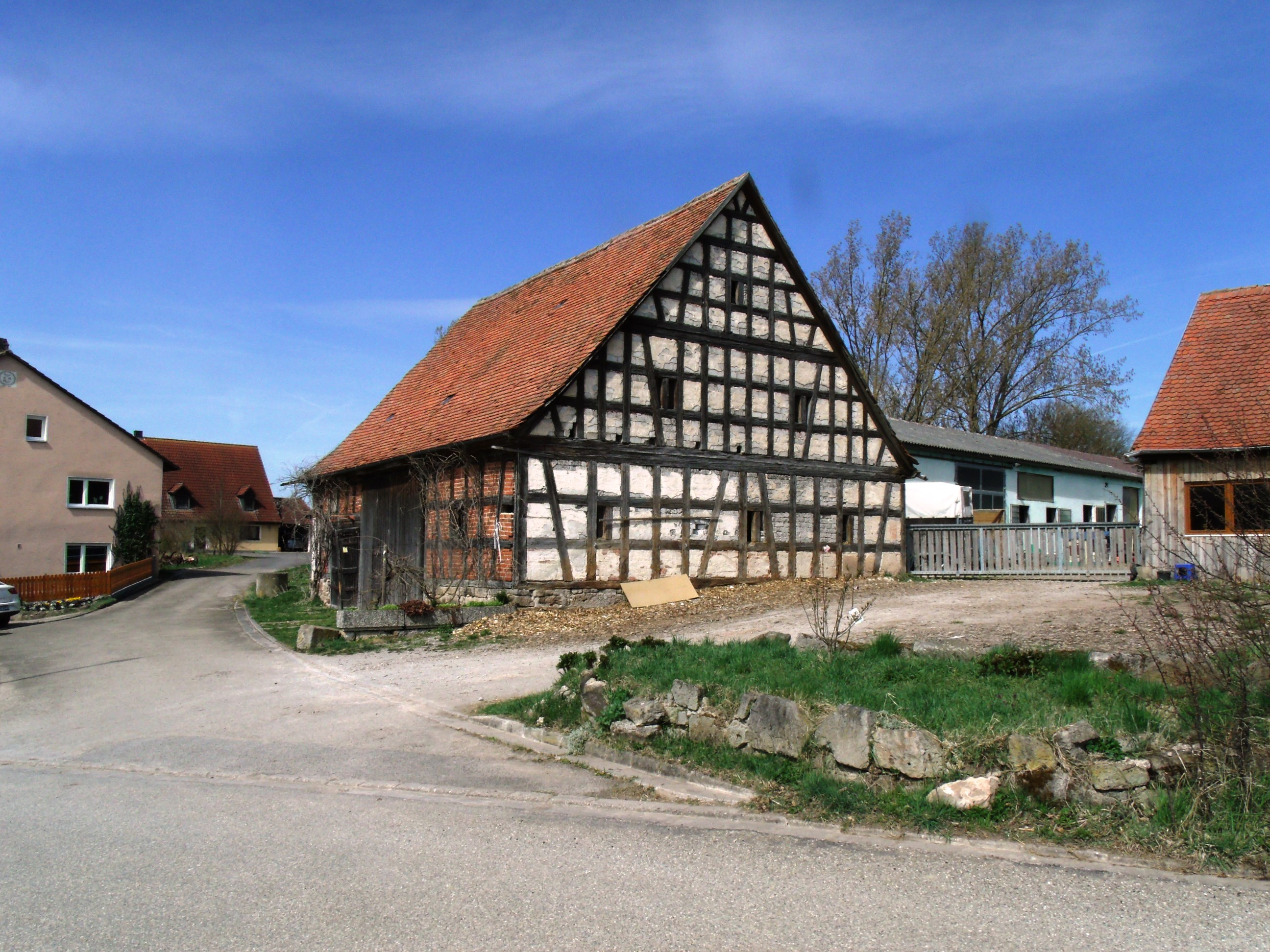 Steinberg, Ortsteil von Leutershausen im Landkreis Ansbach